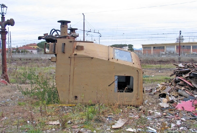 One E.636 (italian locomotive) dismissed.